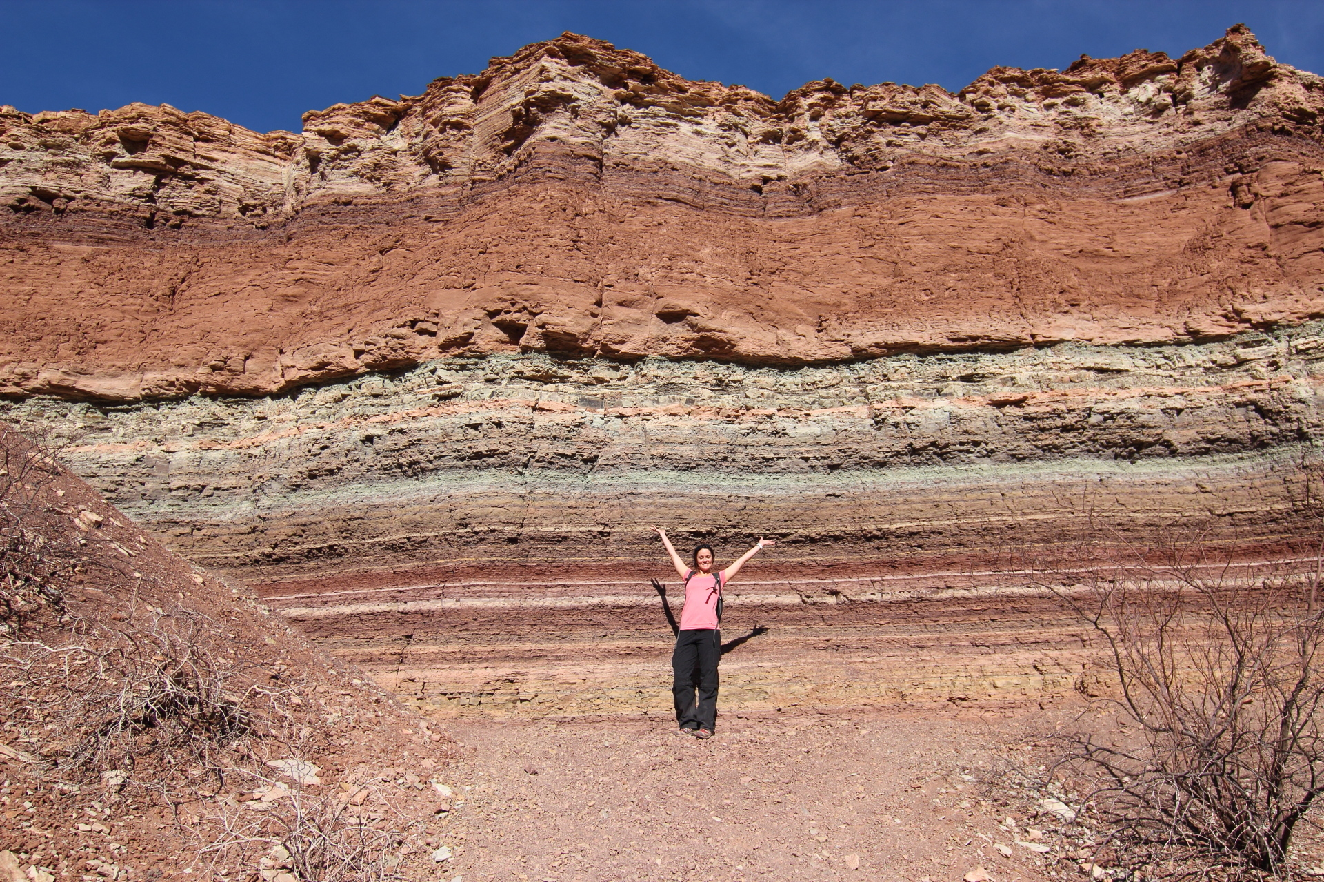 Quebrada de las Conchas, Salta (Argentinien).